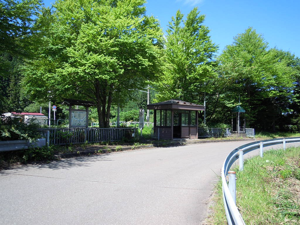 東北自動車道碇ヶ関インターチェンジに併設されている碇ヶ関バスストップ